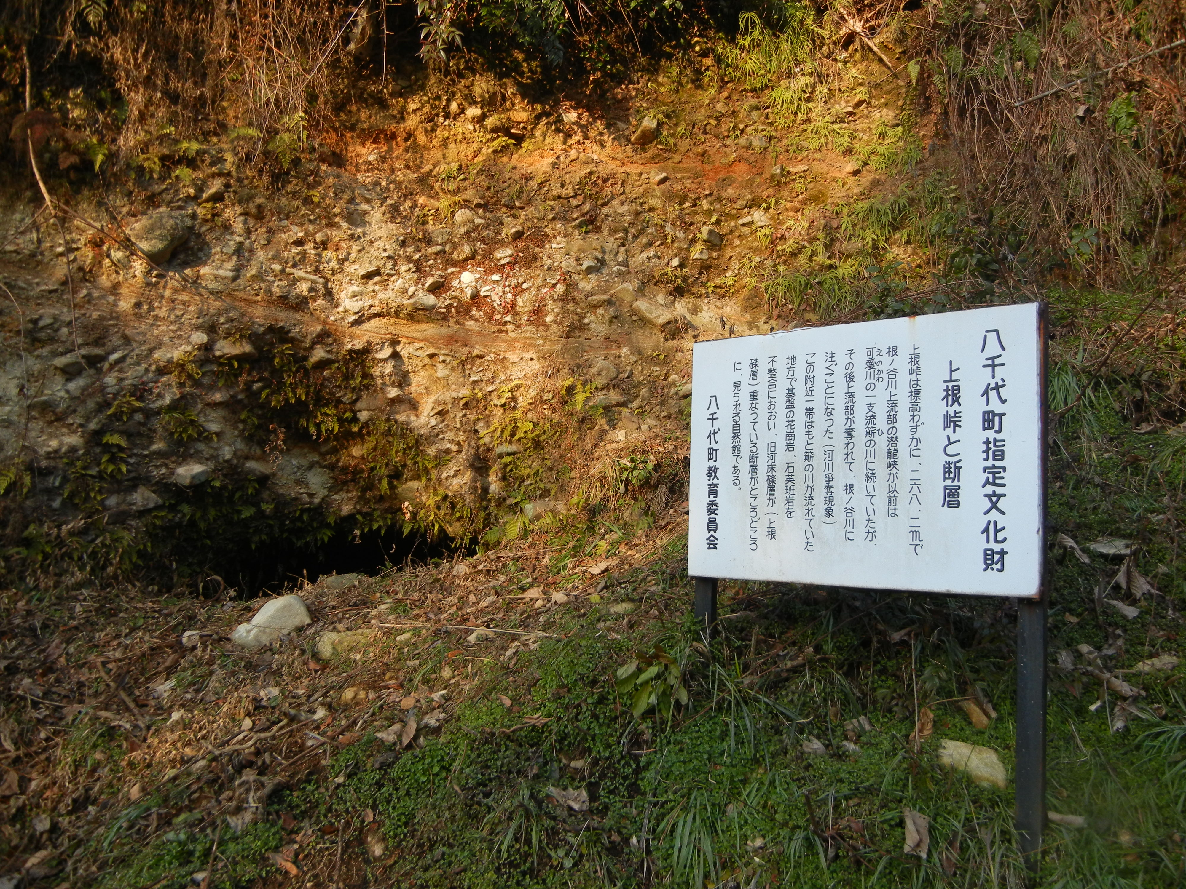 「上根峠と断層」の案内板と山肌の穴